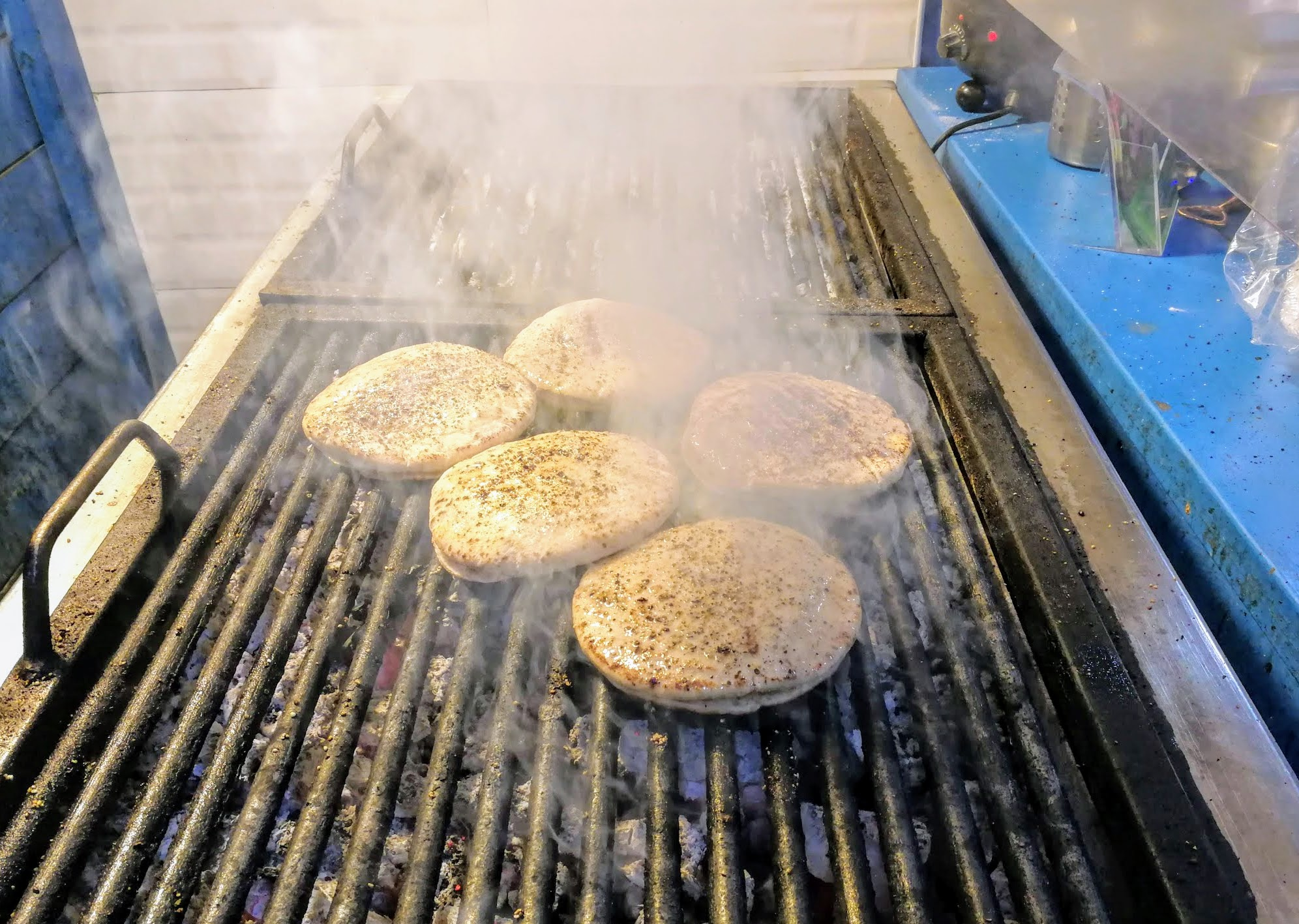 עראייס בפיתה במהלך הכנה על גריל, תל אביב